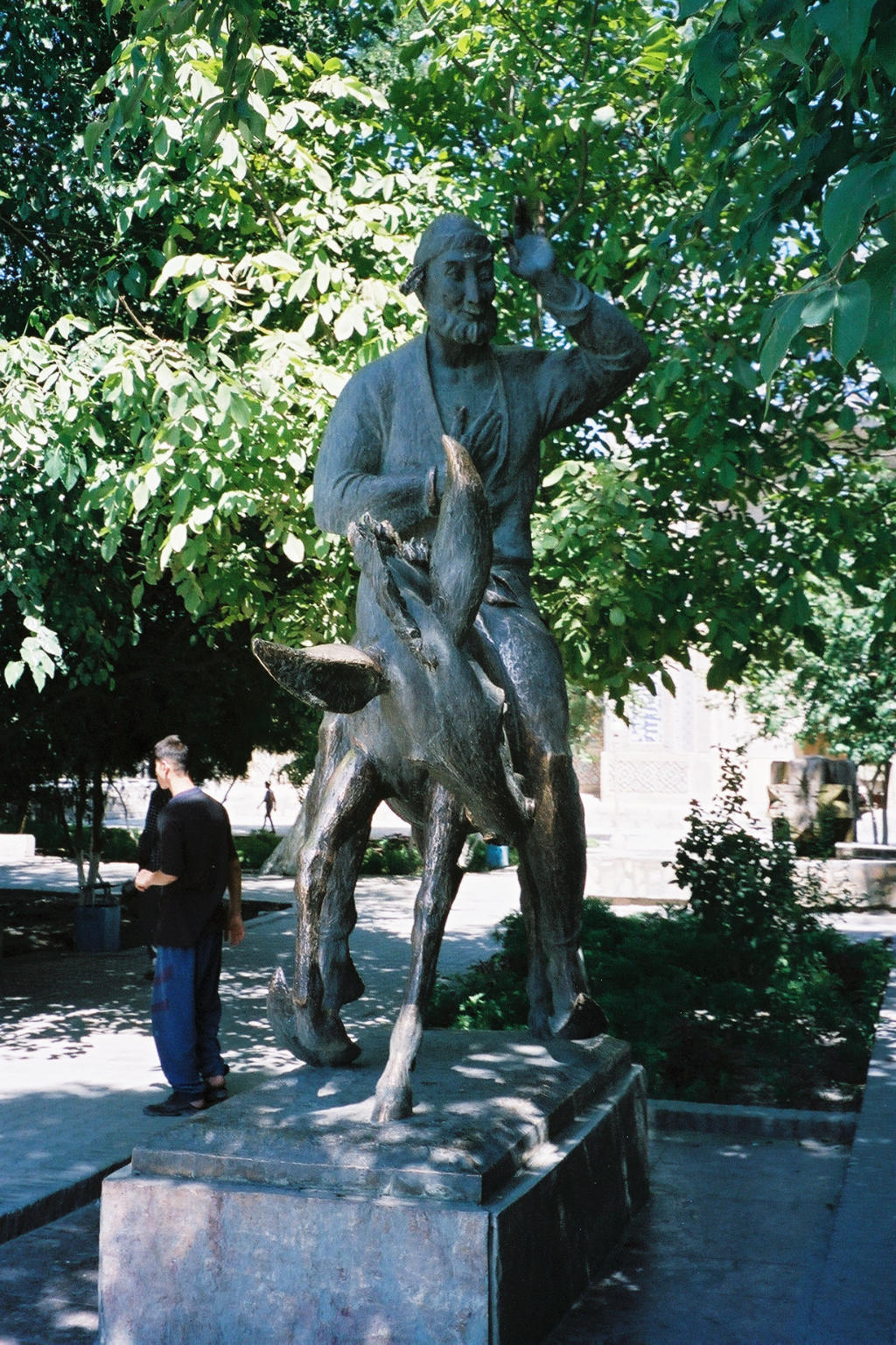 Statue de Nasreddin (Nasrudin, Nasredin, Nasruddin, Nasr Eddin, Nastradhin, Nasreddine, Nastratin, Nusrettin) à Boukhara (Ouzbékistan) photo prise en août 2001 M. Benoist